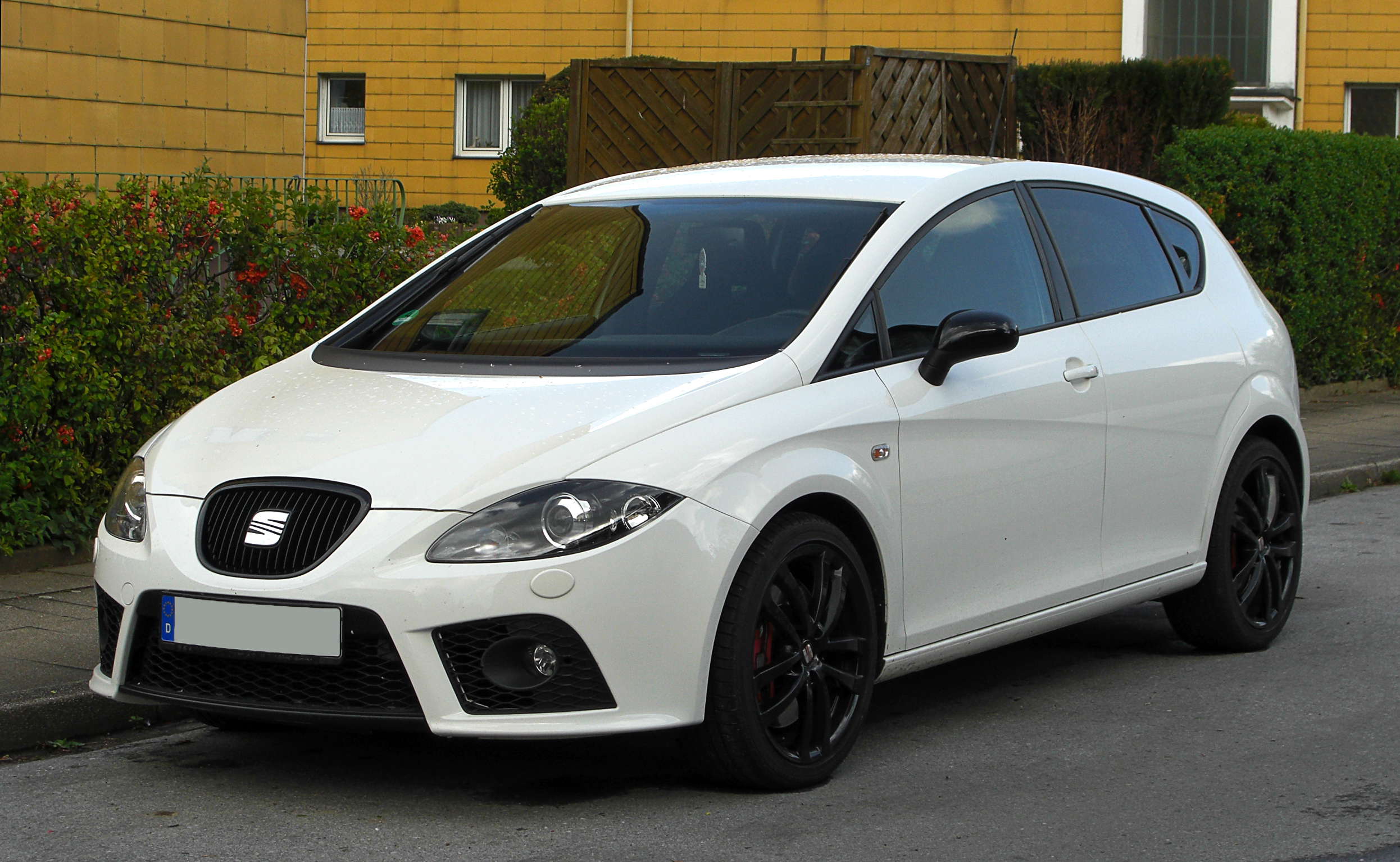 Seat Leon Cupra (1P)